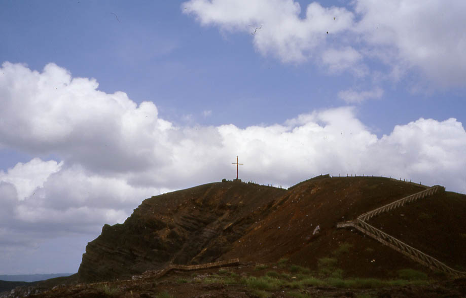 Volcán Masaya. Nicaragua. 2002. Cruz de Francisco de Bobadilla